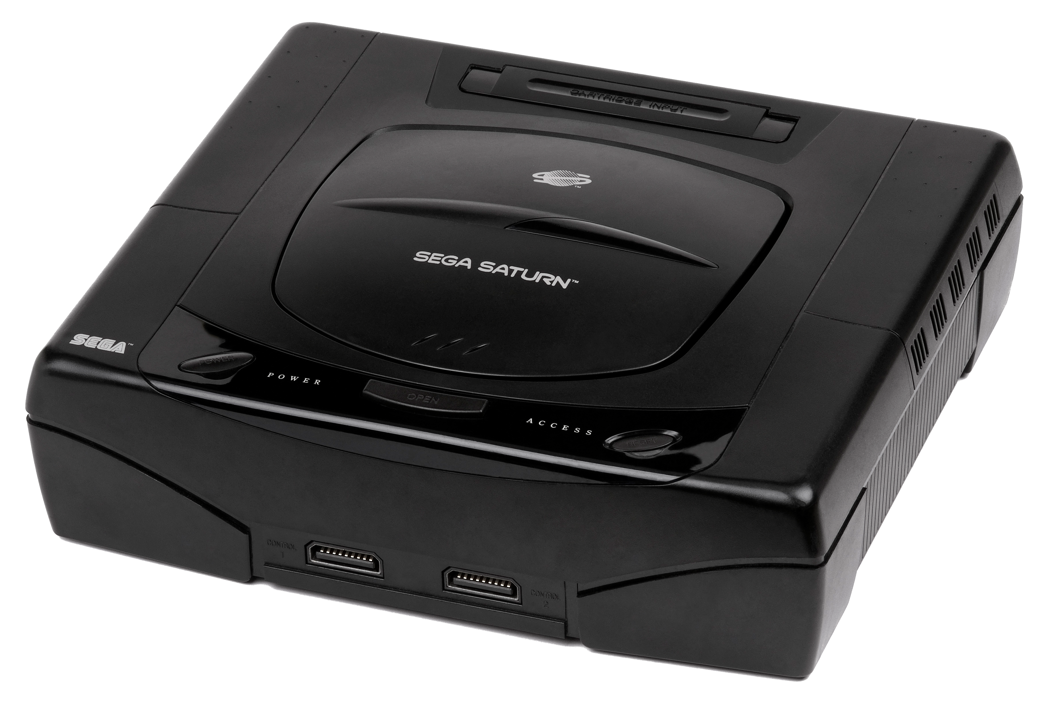 Console Sega Saturn nord américaine. Le premire modèle, celui avec les boutons ovales